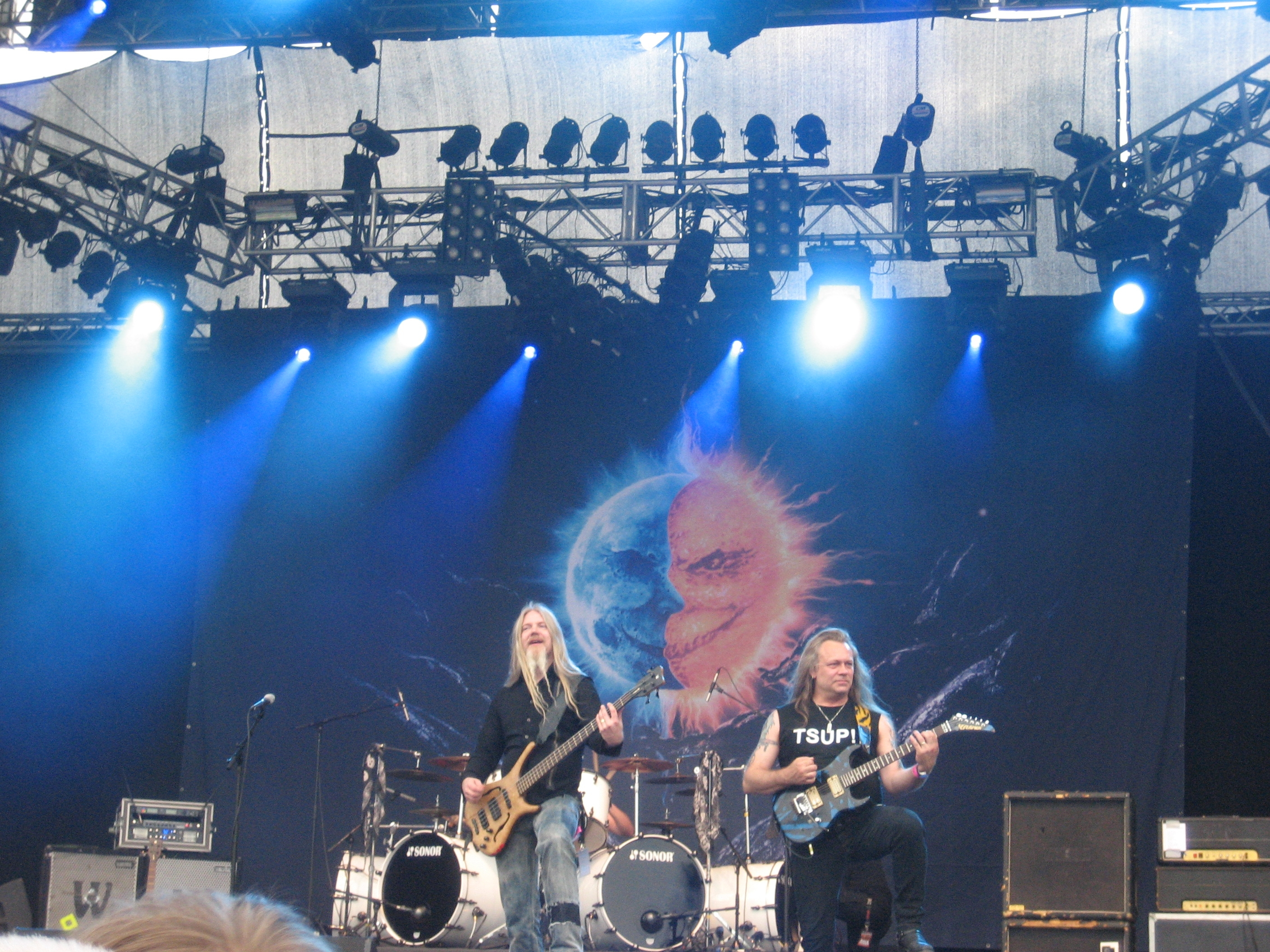 Tarot-yhtye Myötätuulirockissa vuonna 2010